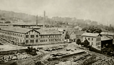 Alter Zweibrücker Bahnhof im 19. Jahrhundert